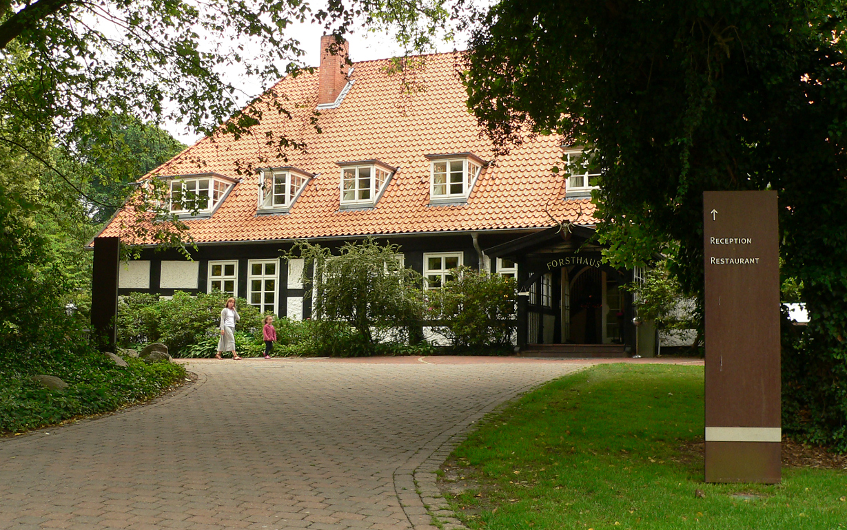 Kloster Heiligenberg, Hotel Forsthaus